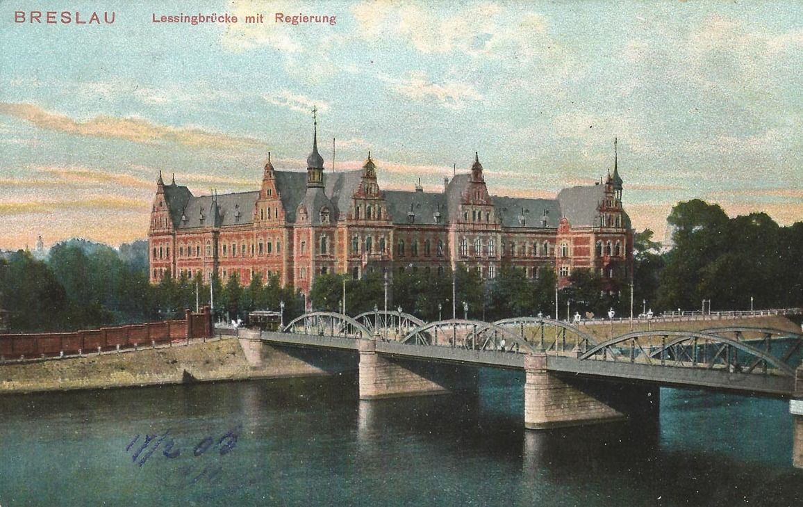 Vue de Breslau au début du XXe siècle (aujourd'hui Wrocław en Pologne).